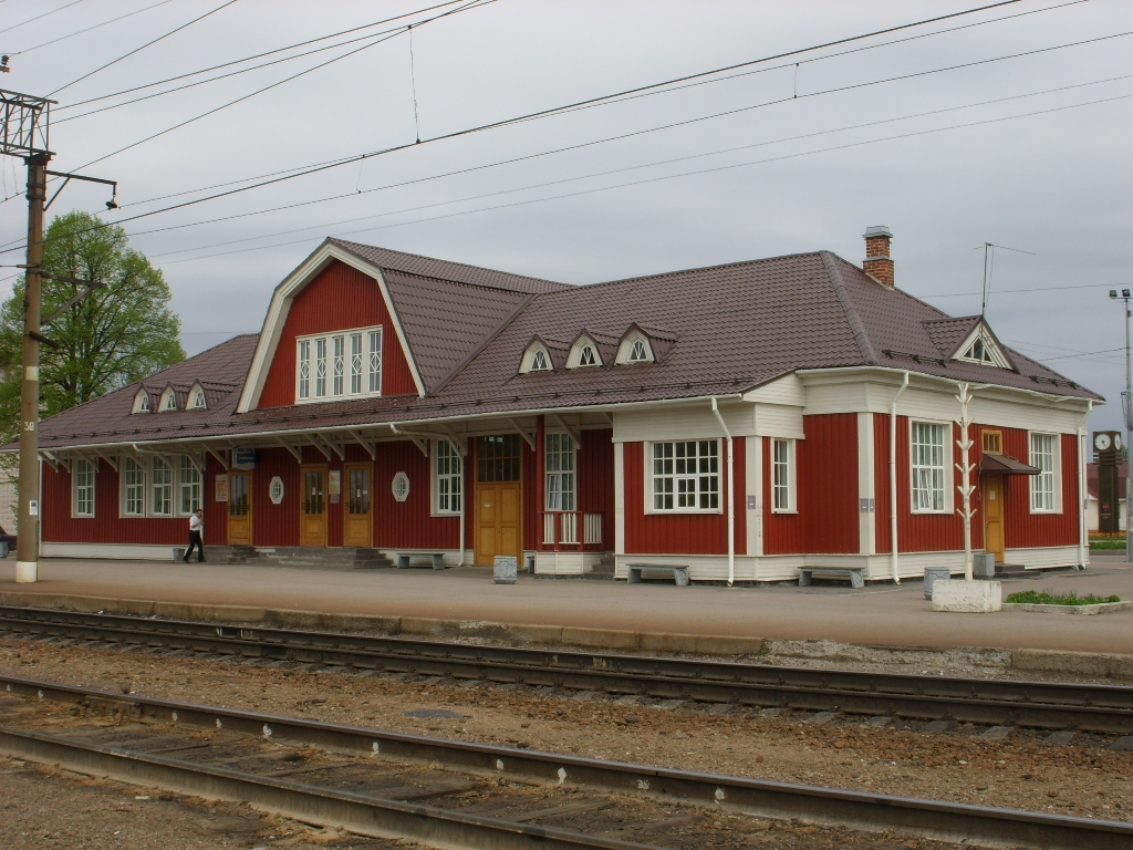 Вокзал ст. Приозерск со стороны путей